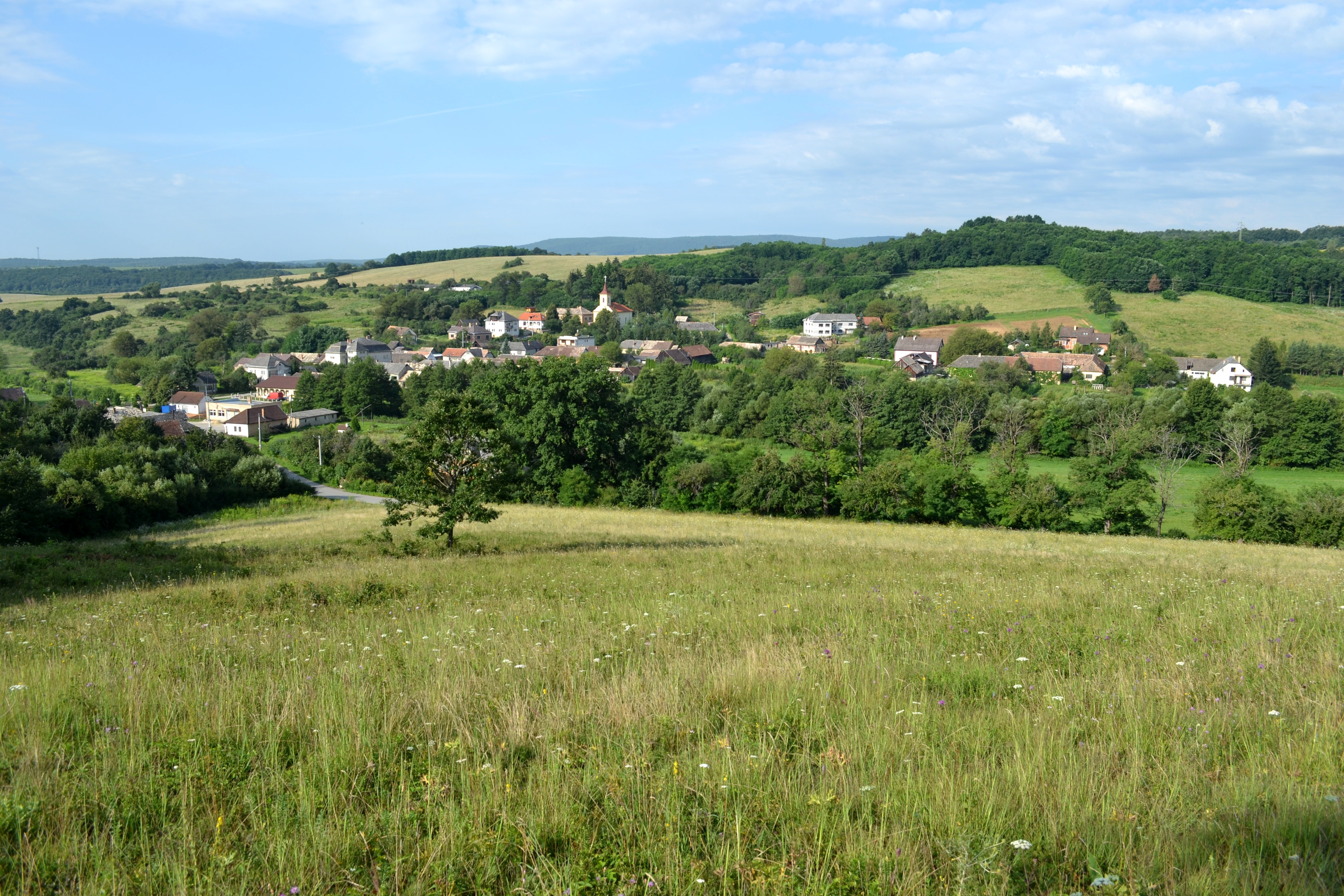 Obec Leváre